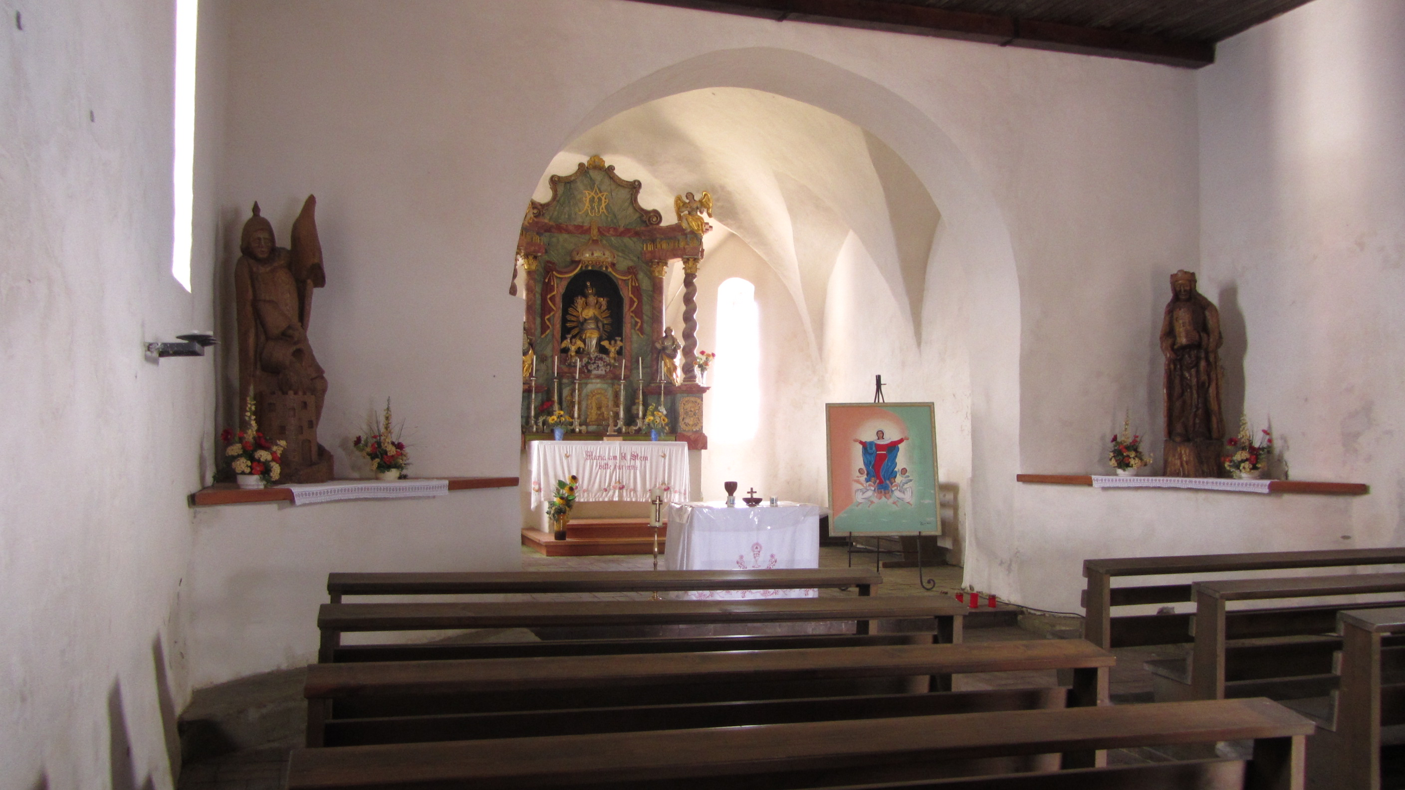 Das Bild zeigt den Innenraum der Deutsche Kapelle auf dem österreicher Berg Dobratsch (Kärnten)